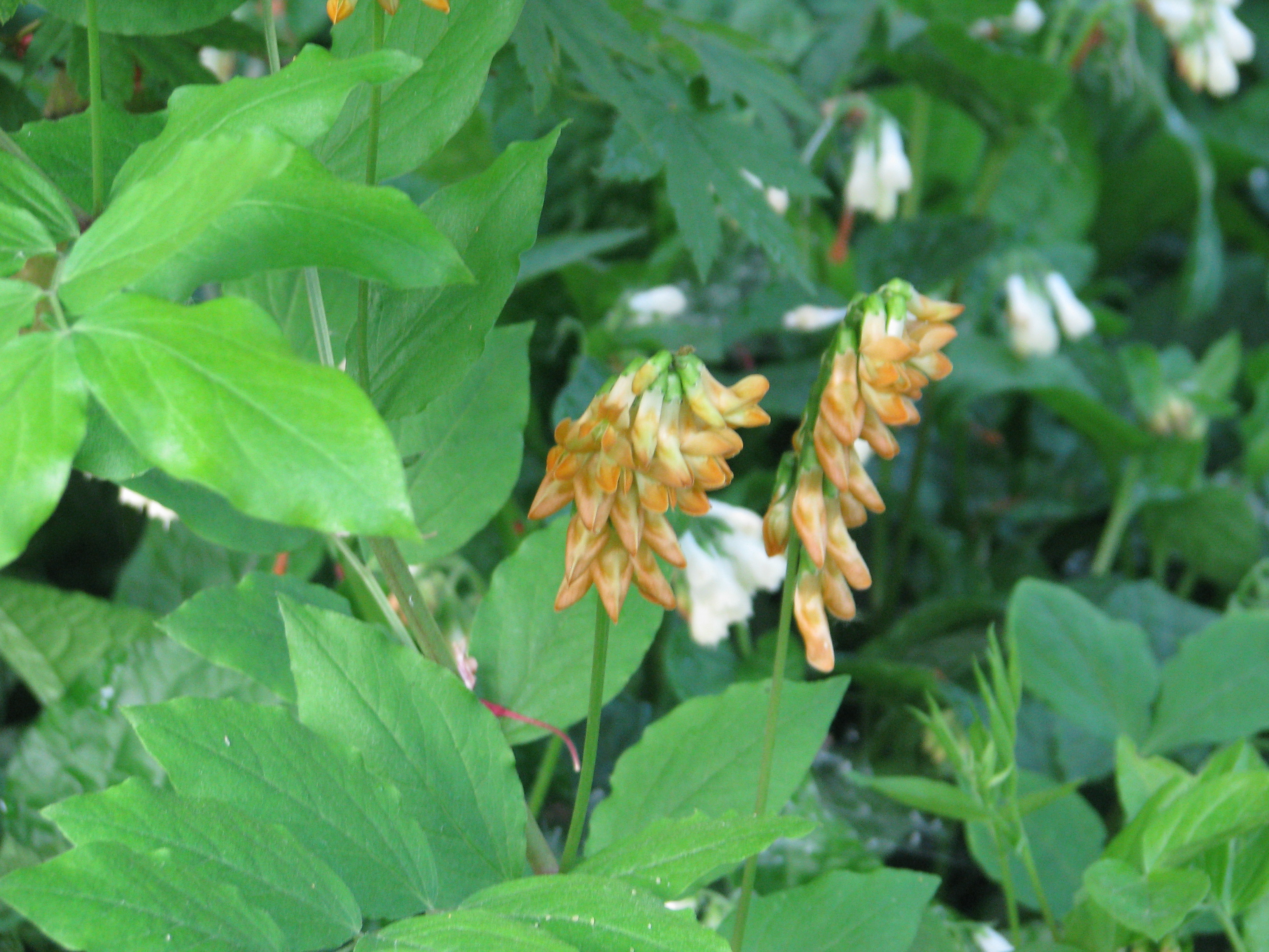 Lathyrus aureus